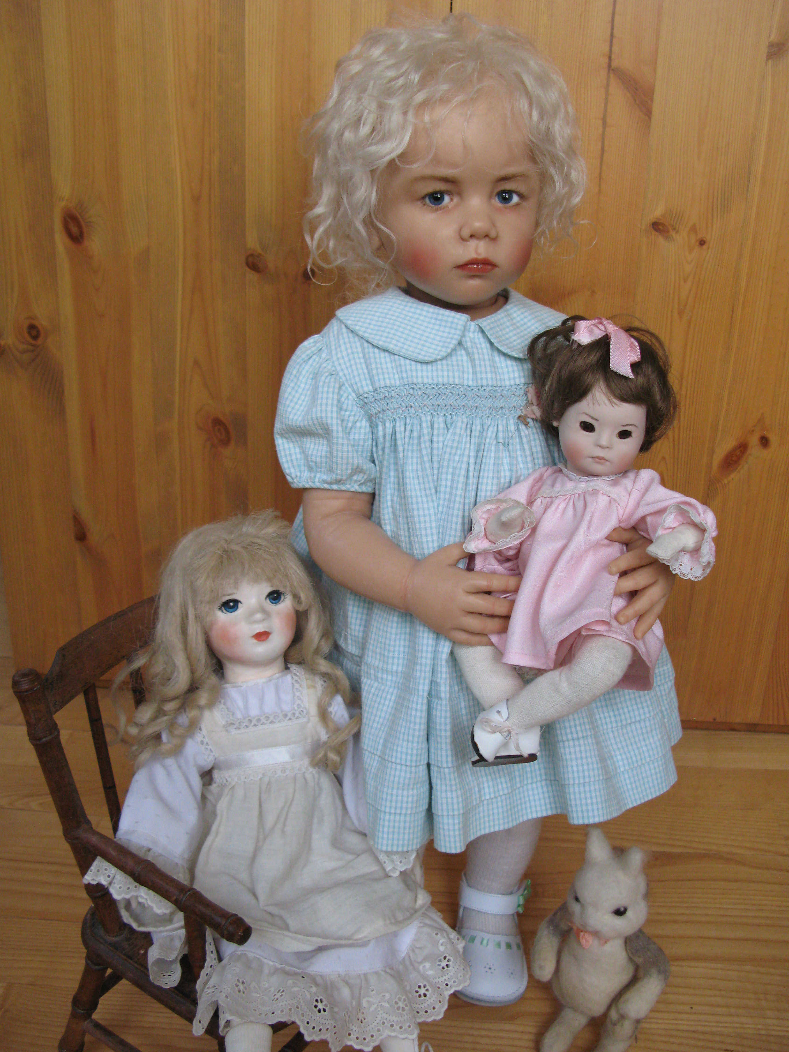 Dukker av Sissel Bjørstad Skille, fra tre ulike perioder. Dukken i stolen med hode av gips, dyppet i bivoks (tidlig 1980-tall); Stående dukke, Jonette (ca 2010); dukken til høyre, hode av porsellen (midten av 1980-tallet)